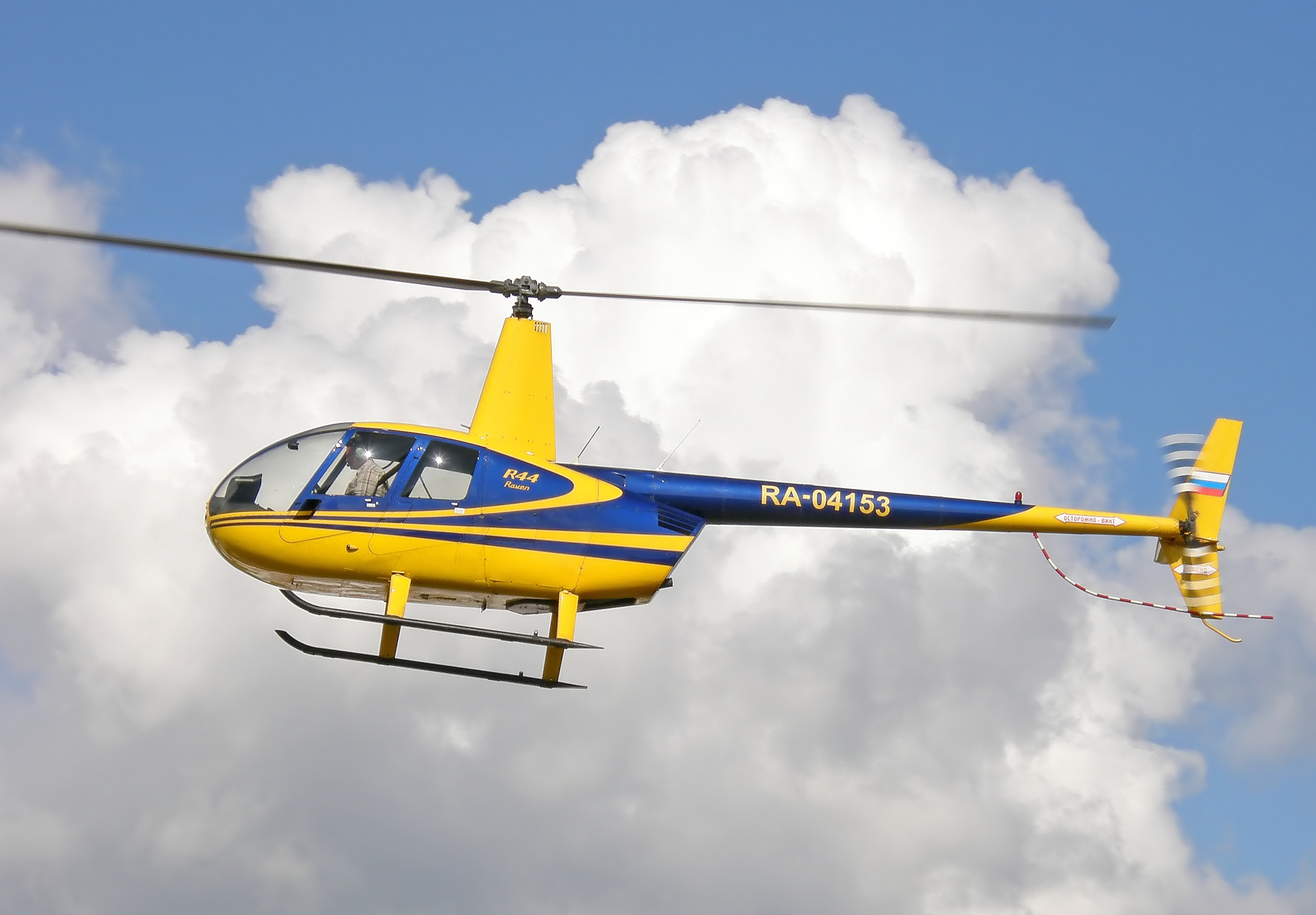 P8021793_filtered